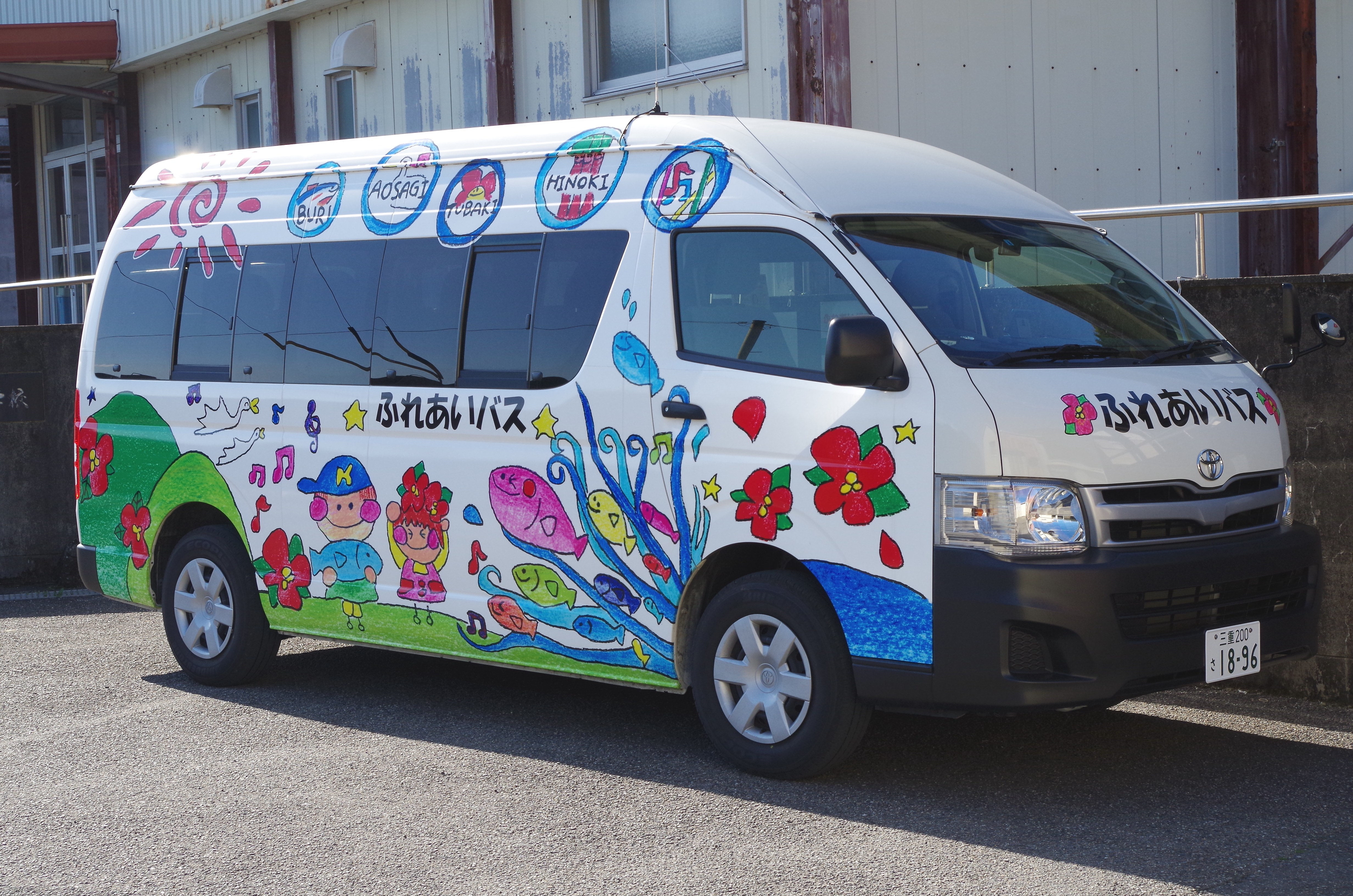 尾鷲市ふれあいバス 須賀利地区 三重県尾鷲市須賀利町